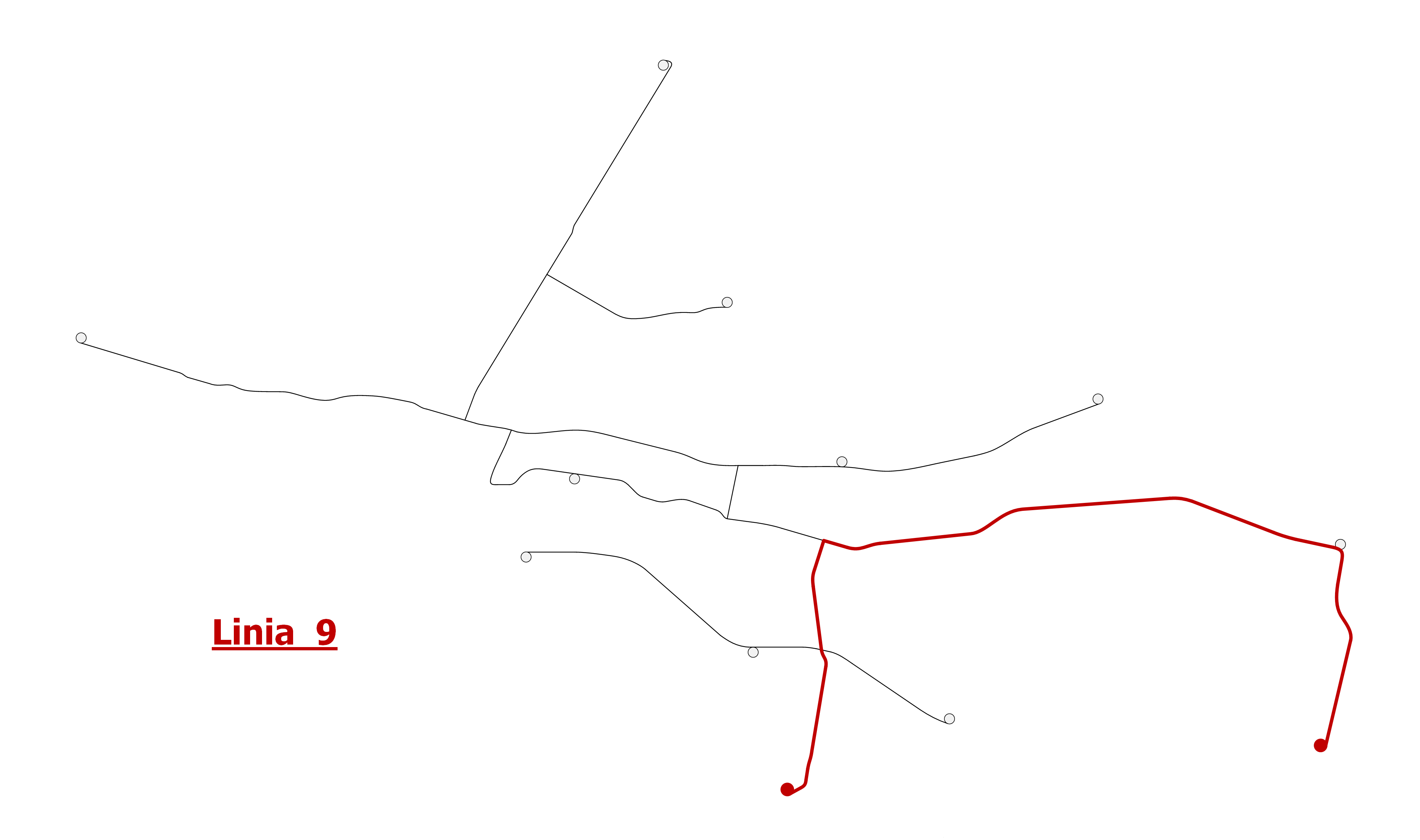 Schemat linii tramwajowej 9 w Bydgoszczy.